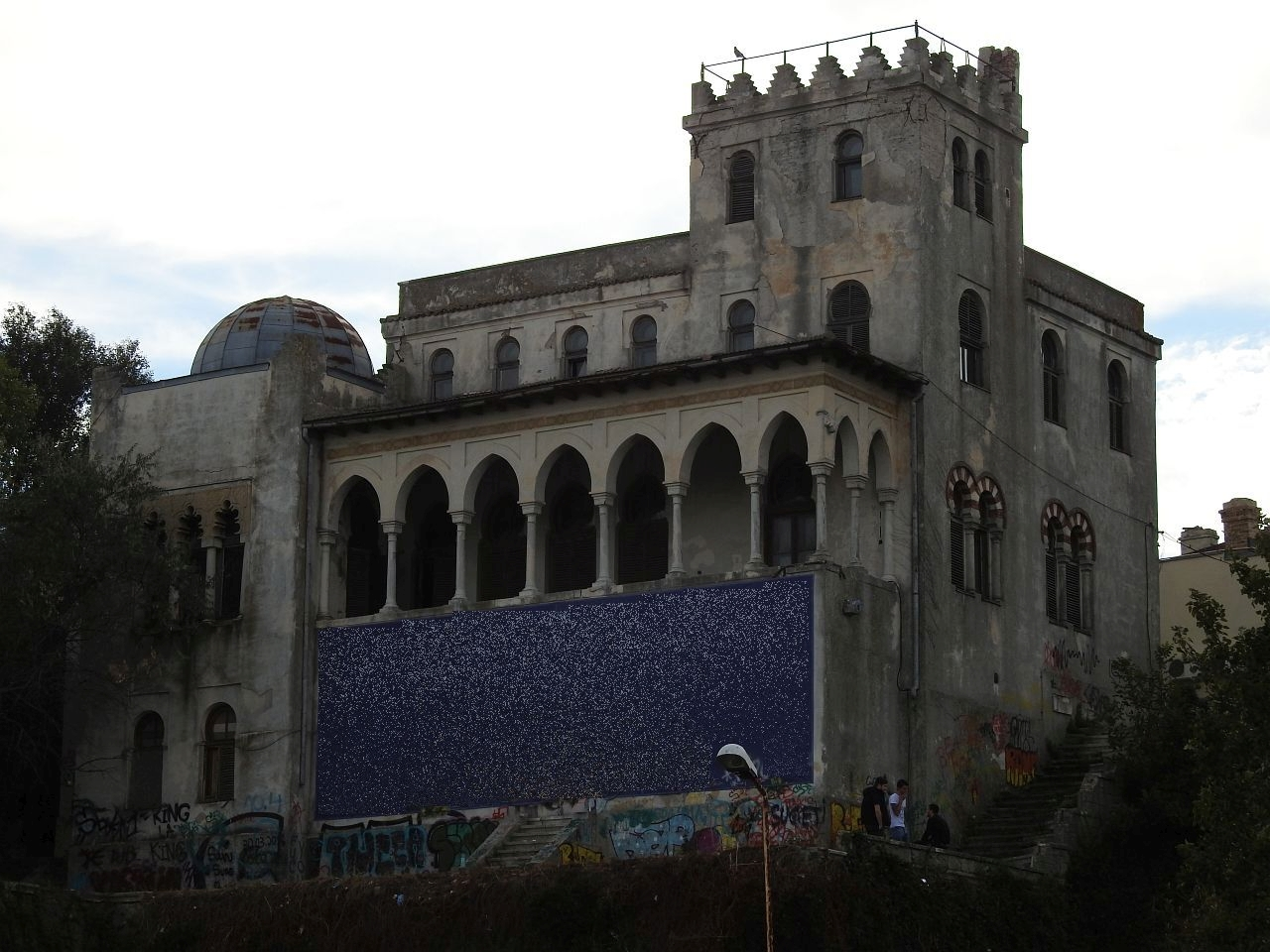 Vila Mihail C. Sutzu